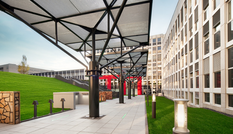 Die Außenleuchten werden im LichtPark präsentiert.